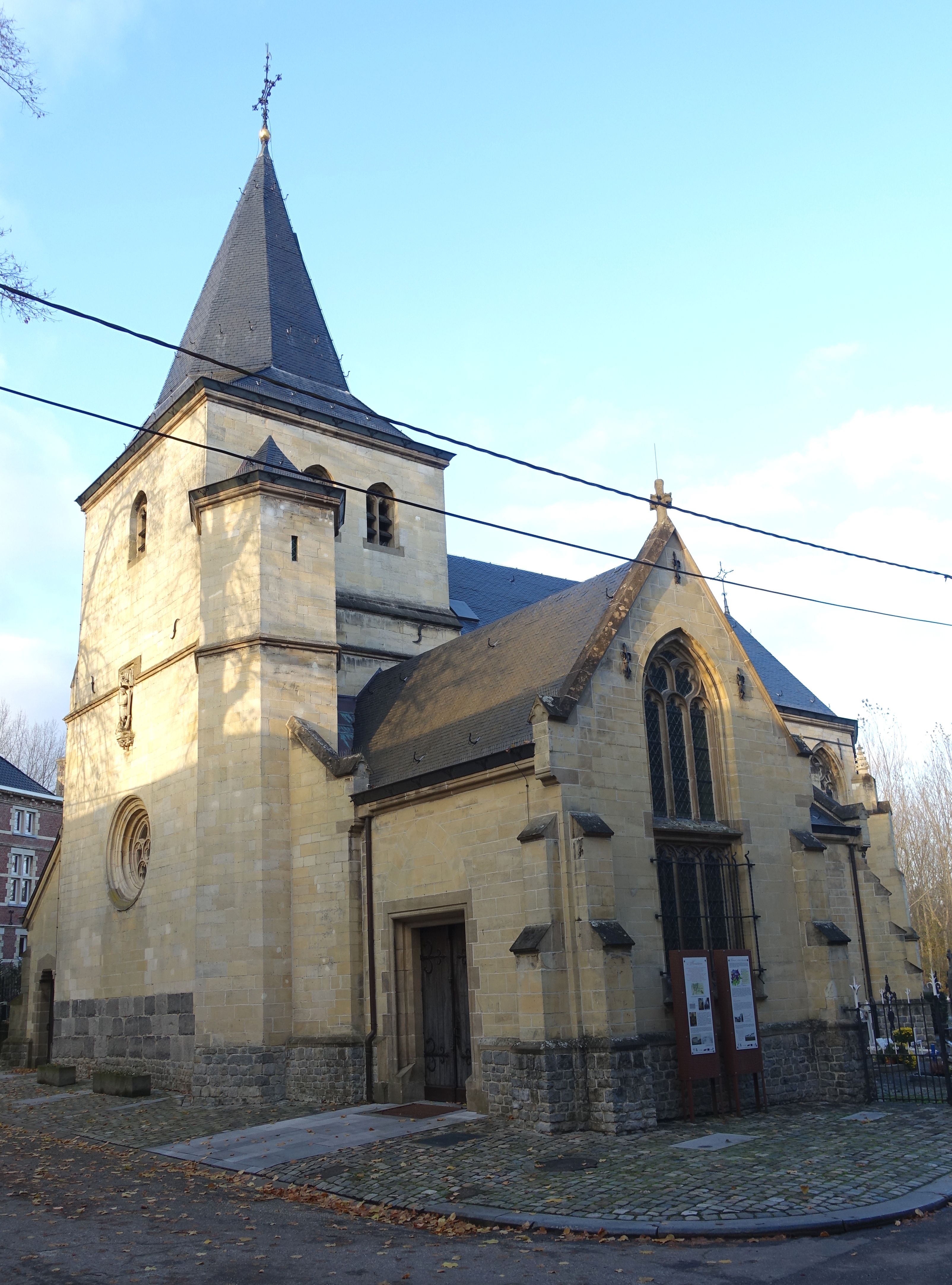 Sint-Stefanuskerk 's Herenelderen (Tongeren) uit 1450